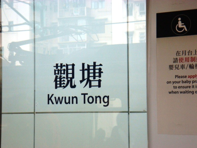 觀塘站1